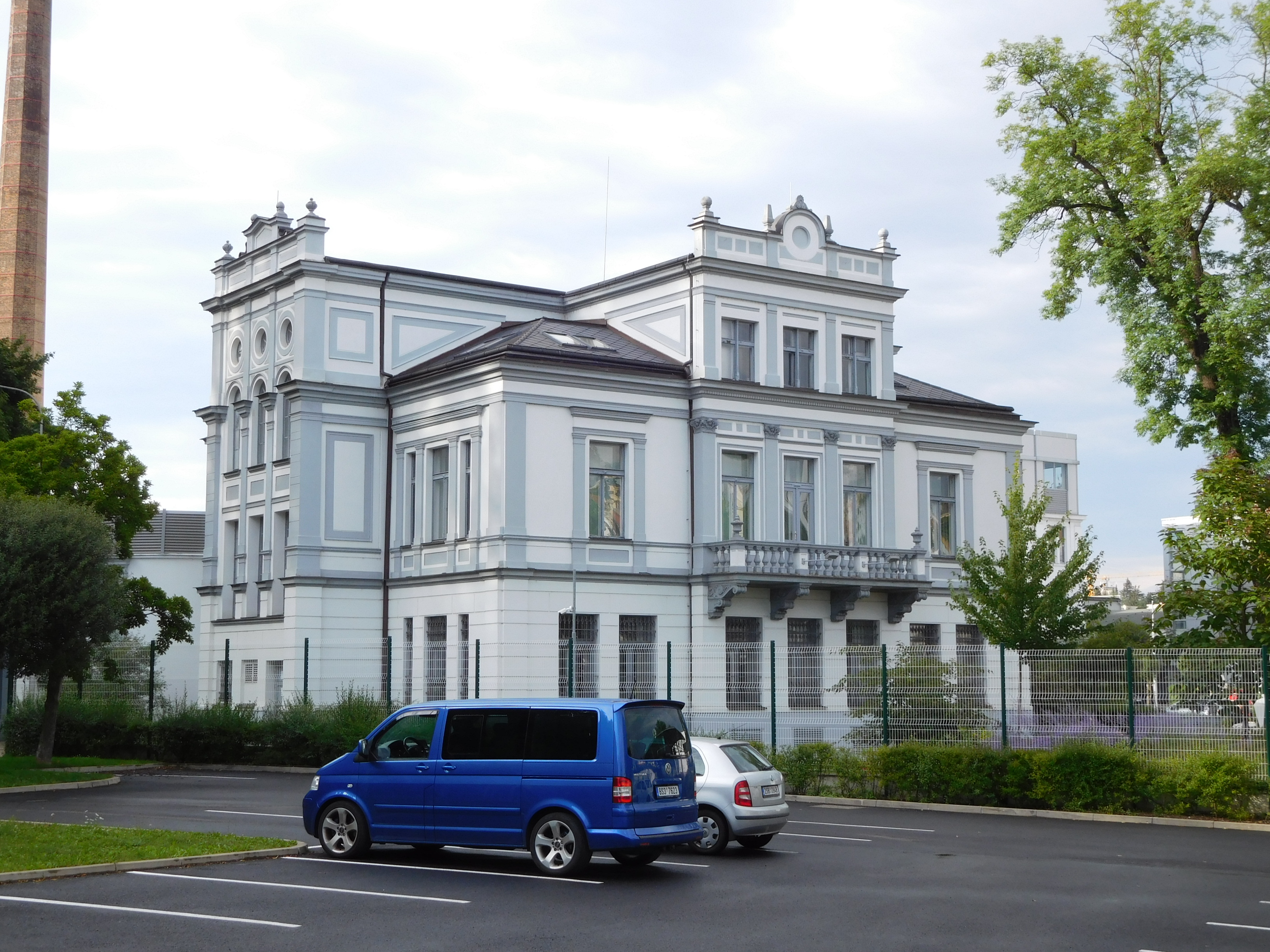 U Česany - Česana (Vývojové a technické centrum Škoda)